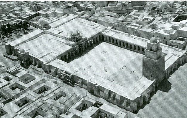 Ancienne vue aérienne de la Grande Mosquée de Kairouan, en Tunisie.